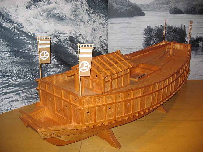 Макет бойового корабля японських піратів флотилії Мураками. Експонат Музею флоту Муракамі (Інносіма, Ехіме, Японія).